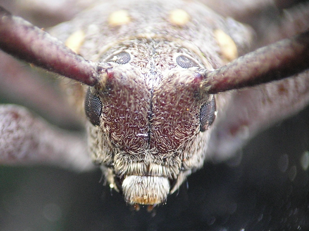 Acanthocinus aedilis, Tycz cieśla, Białowieża, Polska